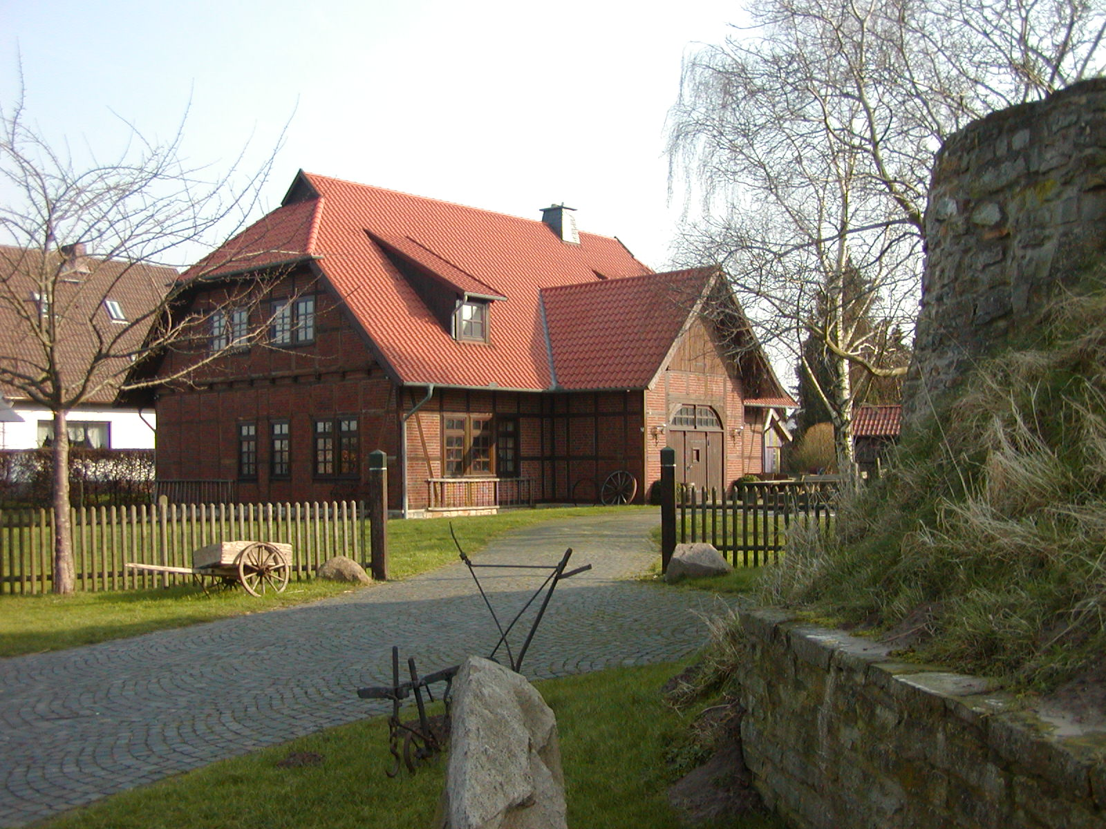 Das Mühlenhaus in Dützen bei Minden in Nordrhein-Westfalen. Das Haus steht in unmittelbarer Nähe zur Windmühle in Dützen, die zur Westfälischen Mühlenstraße zählt.